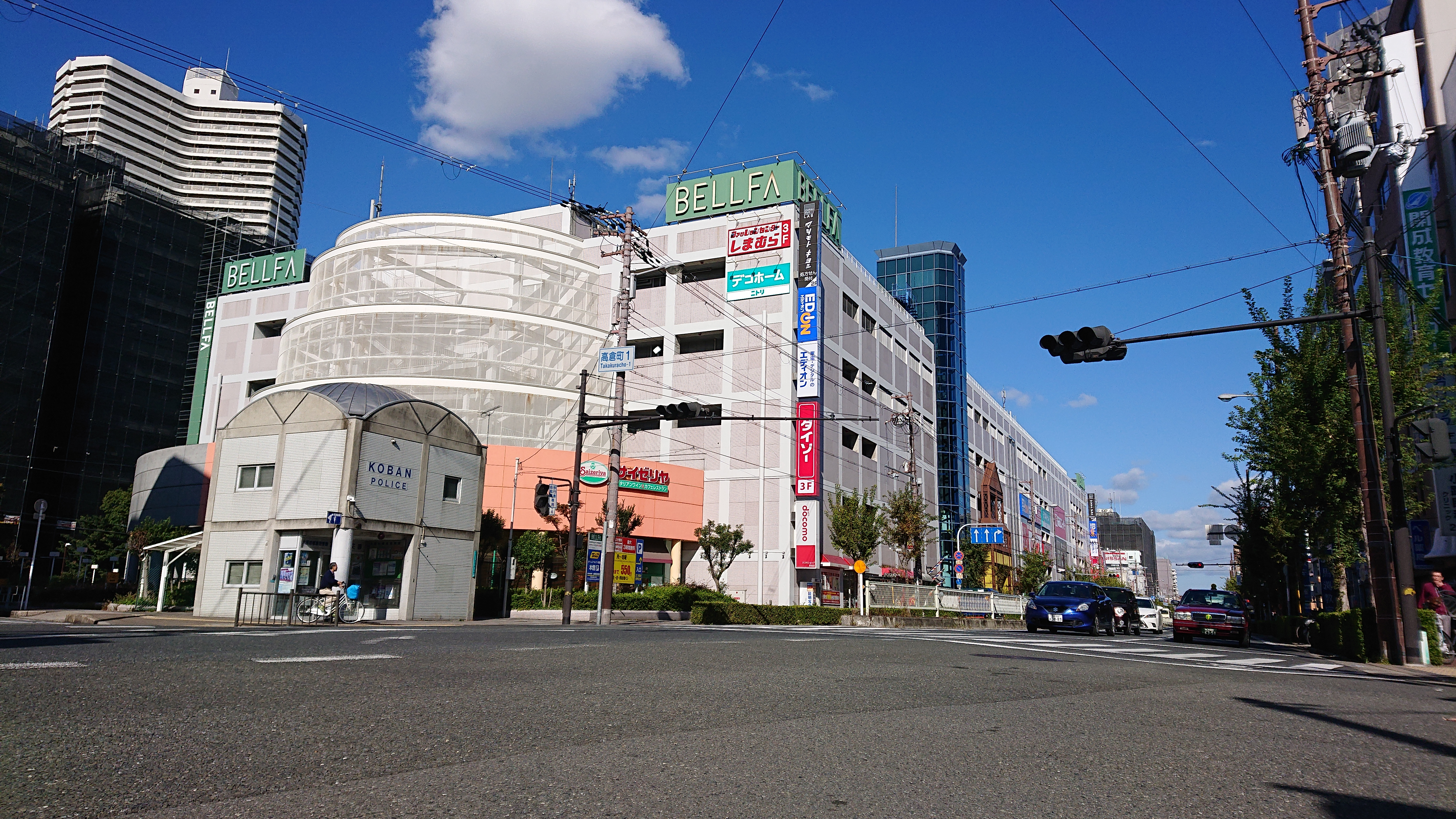 大阪市にあるベルファ都島ショッピングセンター